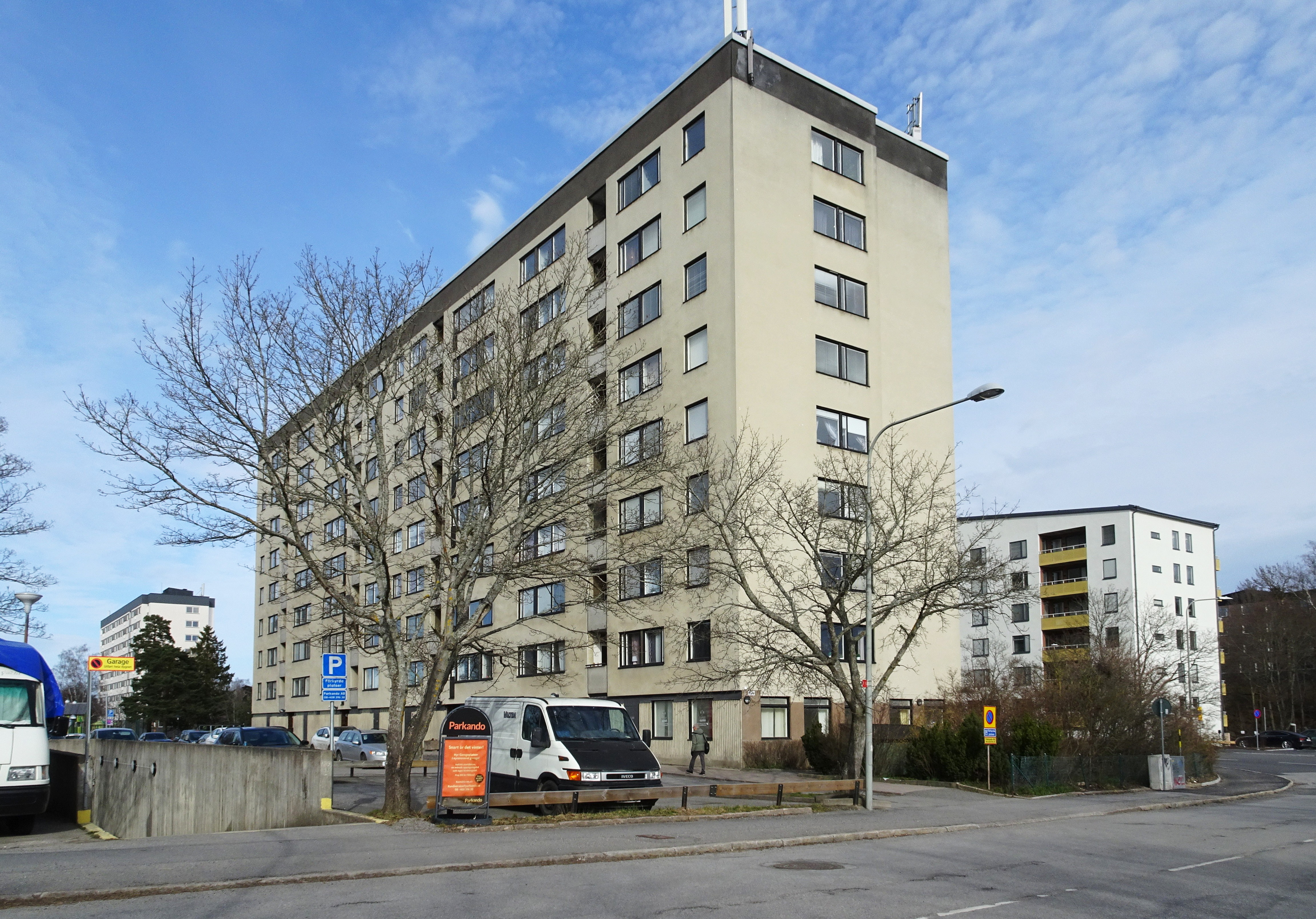 Fastigheten Coldinuorden 3, Bredäng, arkitekt Kjell Abramson byggår 1965